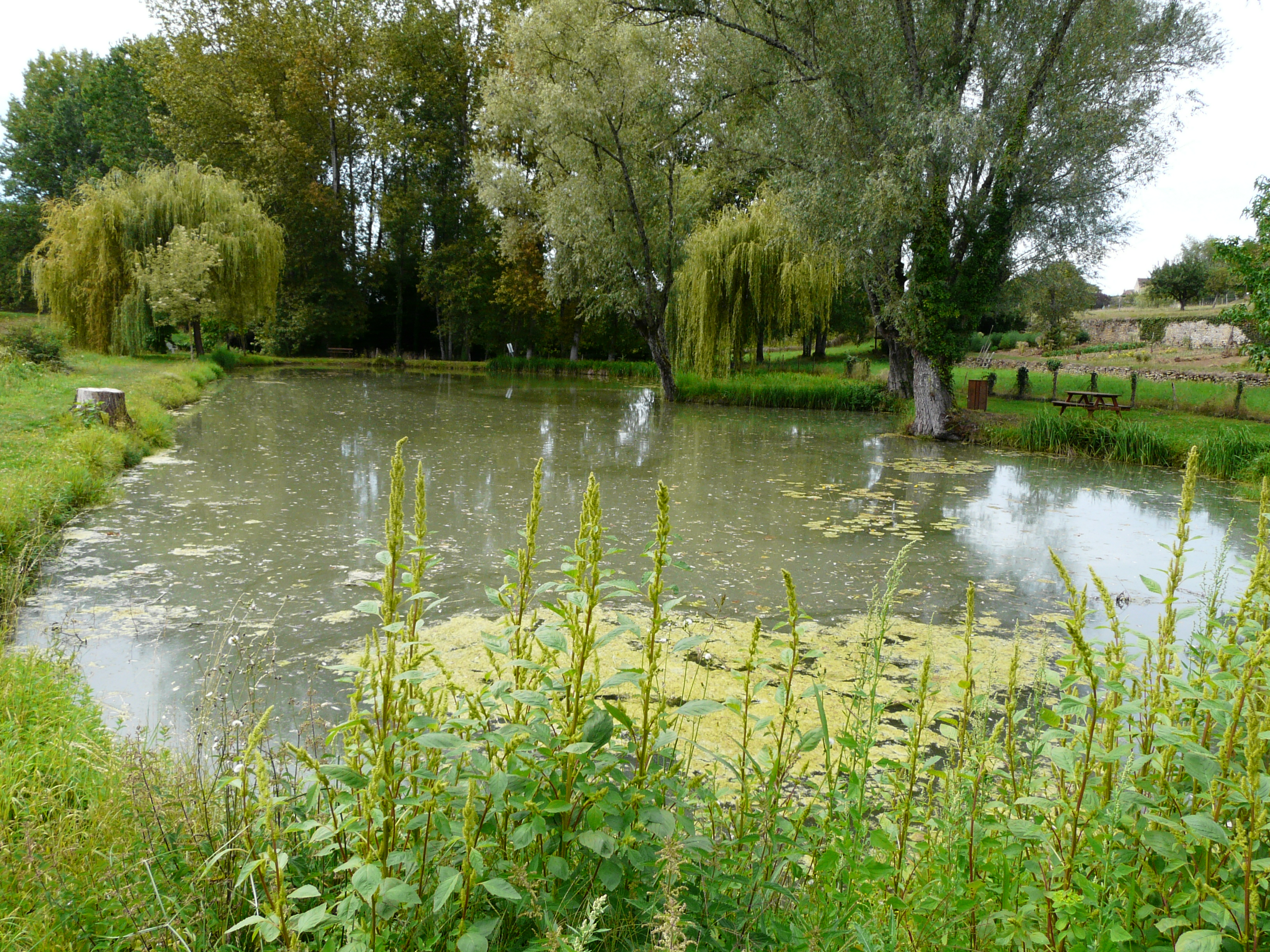 Étang alimenté par la Sérouze en bordure de Pressignac, Pressignac-Vicq, Dordogne, France.